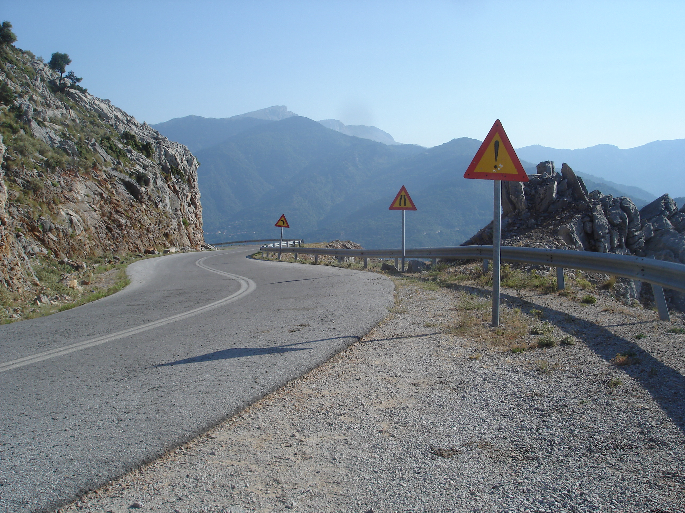 Route sinueuse en montagne de l'arrière pays de la ville de Sténi sur l'ile d'Eubée (Greece).